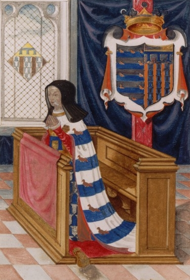 Marie de Châtillon priant ("Marie de Châtillon praying"). In English history she is known as "Marie de St Pol", she was a member of the Châtillon family. Marie de St Pol, Countess of Pembroke (c.1303–1377) the wife of Aymer de Valence, 2nd Earl of Pembroke (c.1275-1324) and foundress of Pembroke College, Cambridge. Arms of Valence (Barry (of ten) argent and azure, an orle of French martlets gules) impaling St Pol (Châtillon): (Gules, three pales vair a chief or). With arms of St Pol in stained glass in a lozenge-shaped shield appropriate for a female armiger. The arms of St Pol and Valence are also displayed on her mantle.